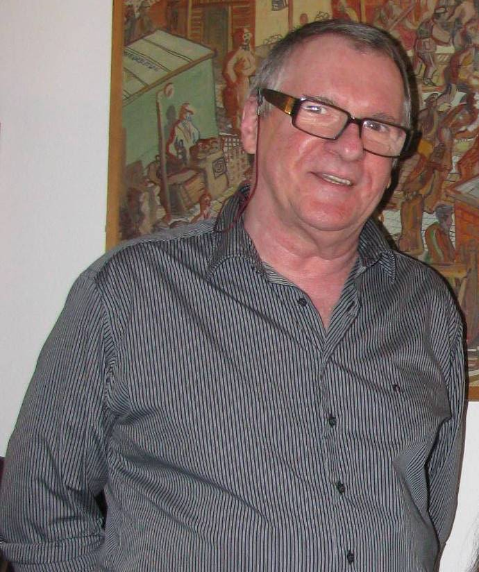 Aktuelles Bild von Jerzy Husar